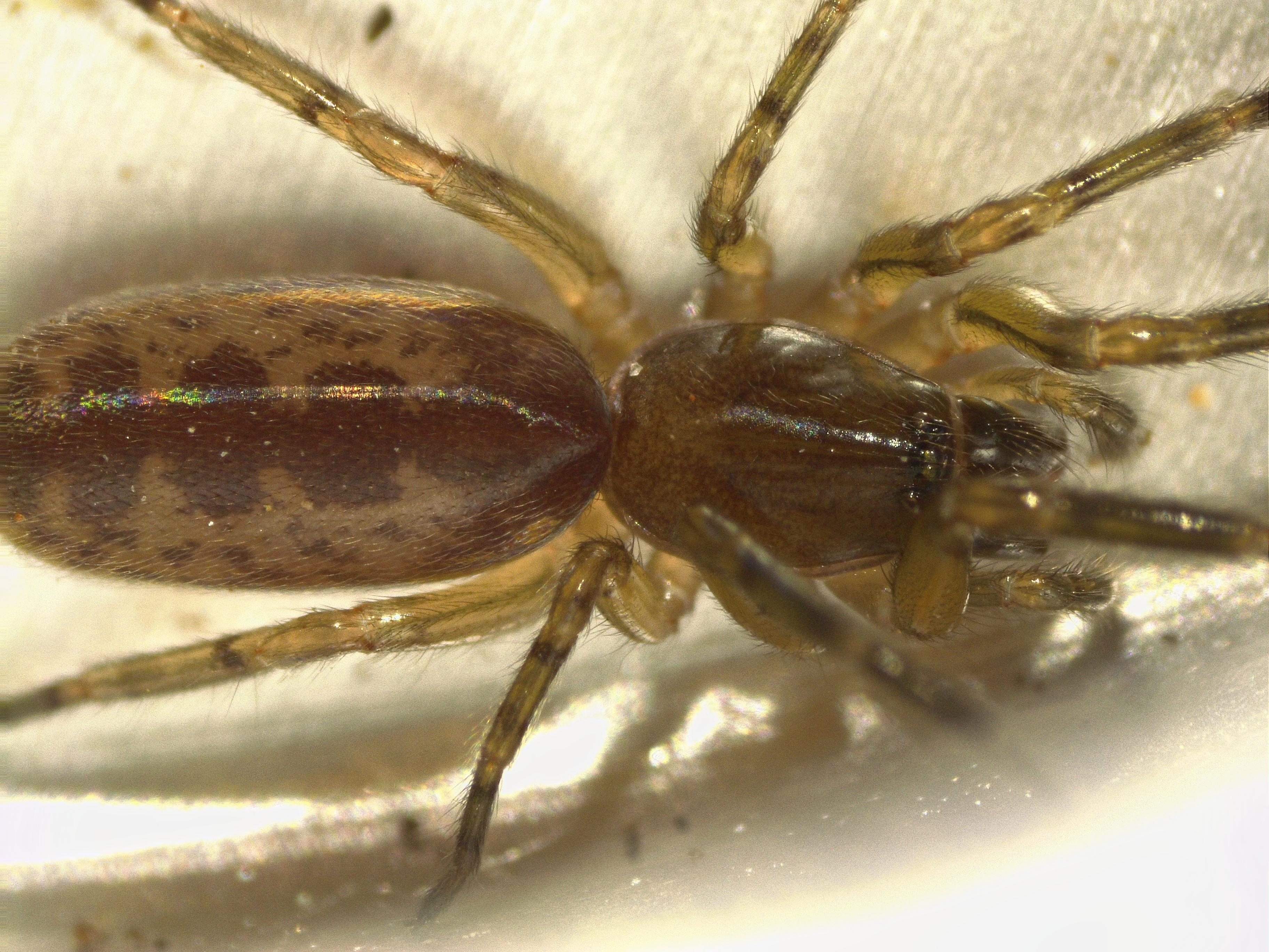 Segestria senoculata (Linnaeus, 1758), Dyrehaven, Denmark, 19 August 2017